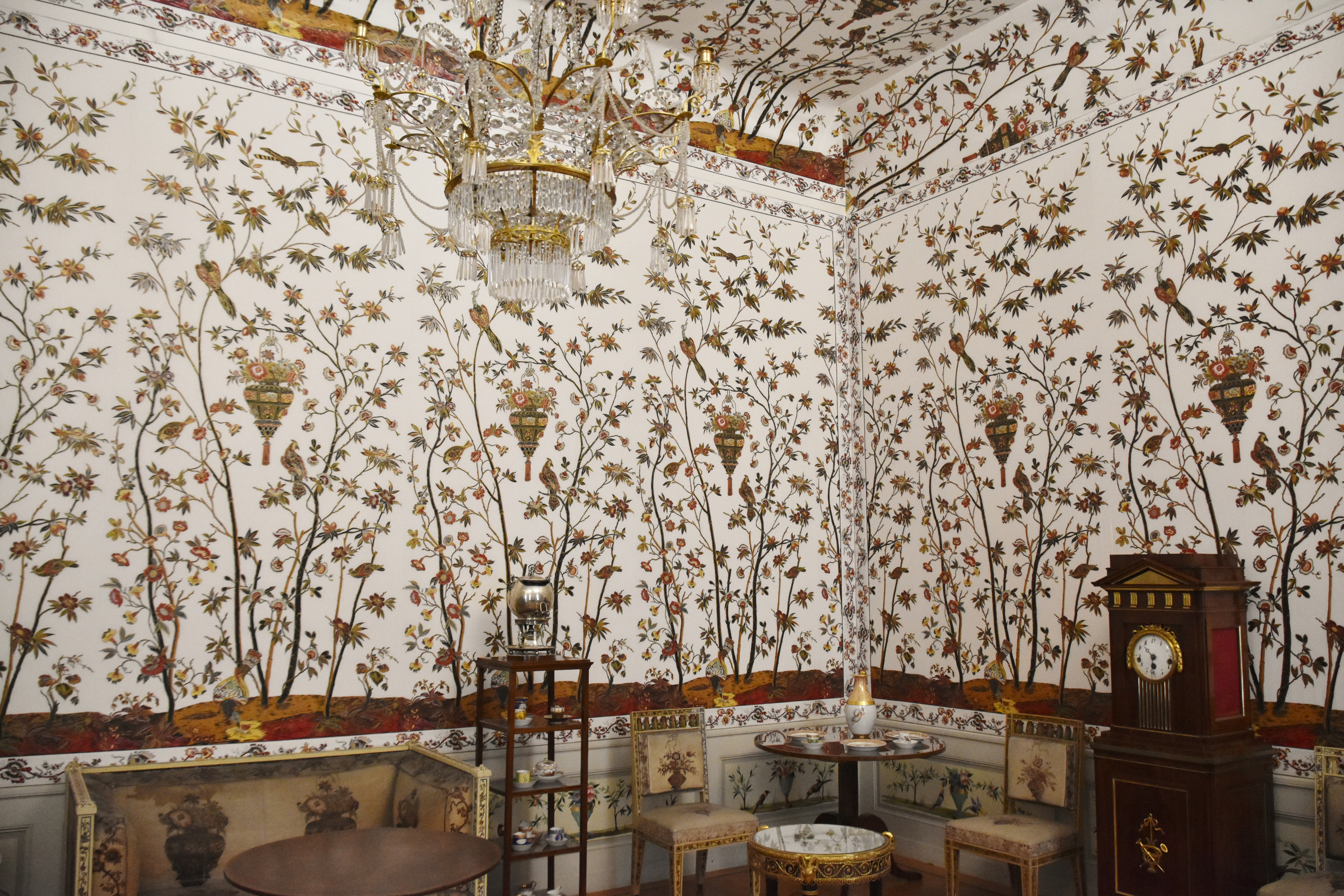 Charlottenburg Palace, 1695-1746, Berlin (89)